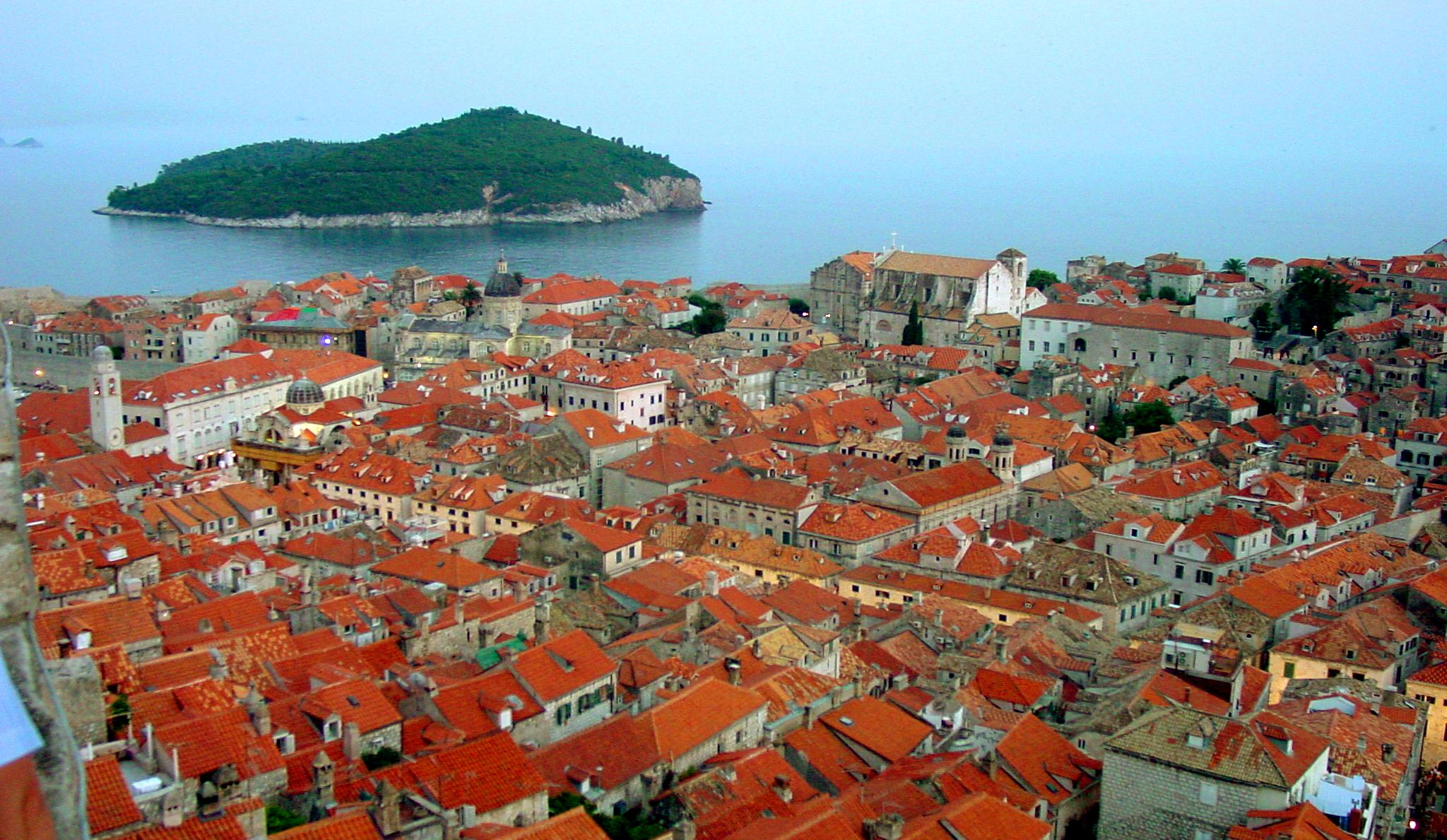 Дубровник (слику направио Борис Малагурски) ☺ Ову слику је направио Борис Малагурски.